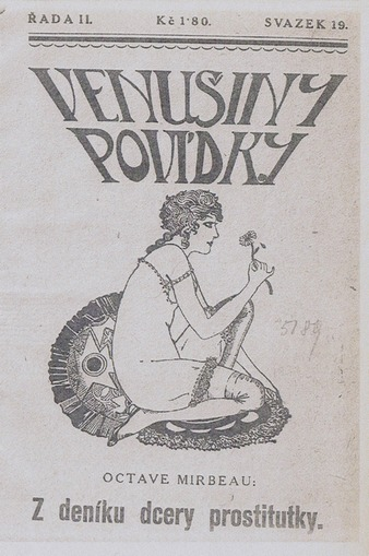 Traduction tchèque de textes d'Octave Mirbeau (1848-1917)